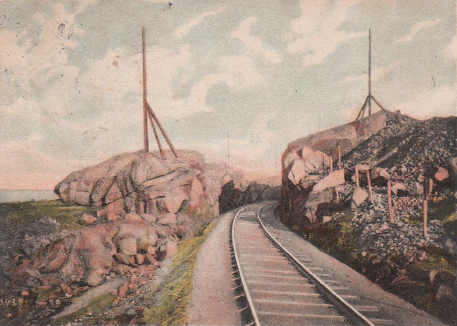 Västkustbanan vid Varberg. Vykort från början av 1900-talet.